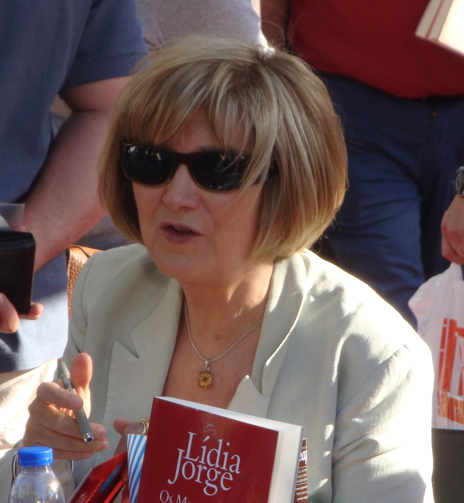 Lídia Jorge, escritora portuguesa, na Feira do Livro, em Lisboa, em 2014